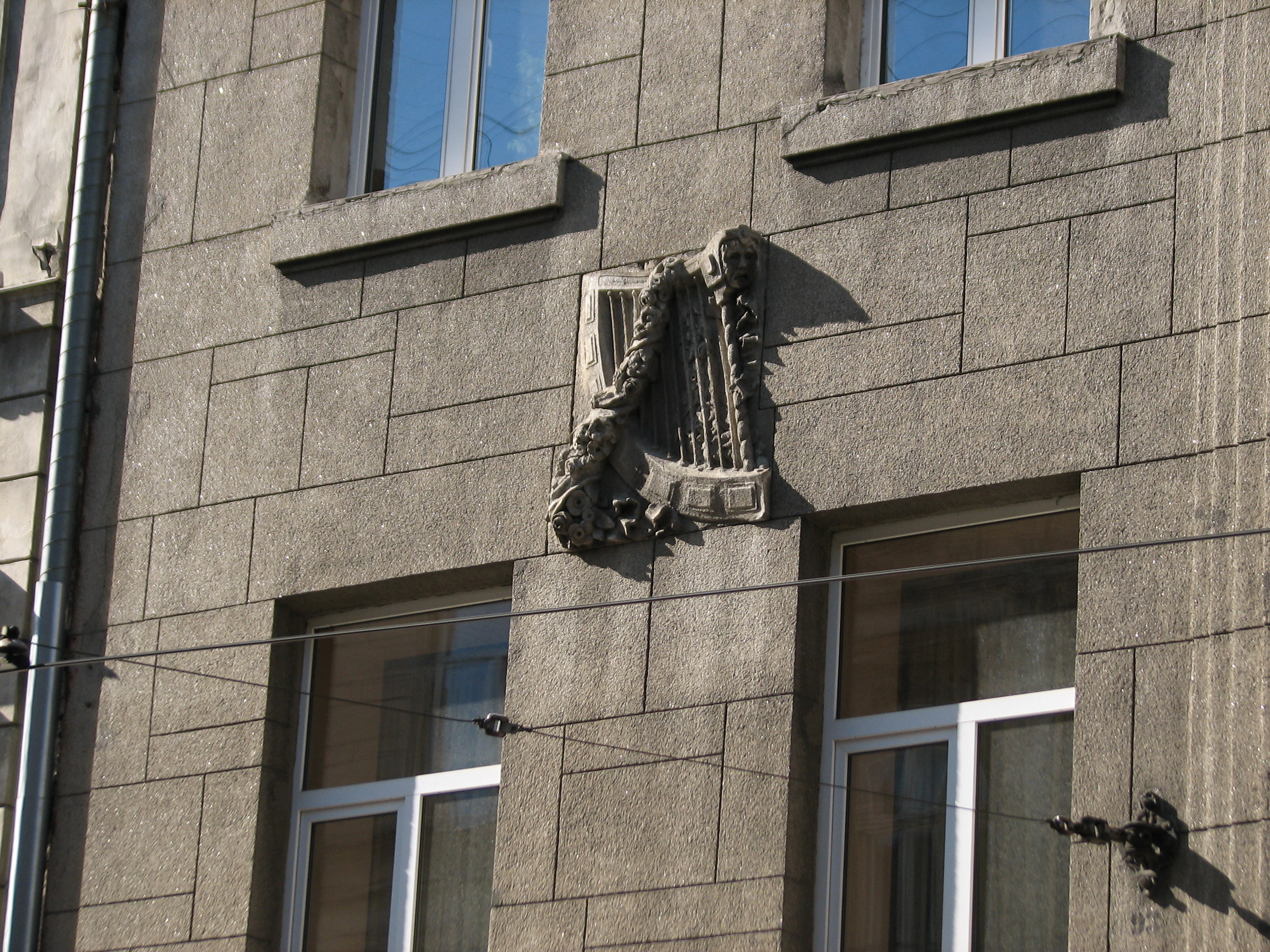 Будинок № 14 на вулиці Дорошенка у Львові. Збудований 1911 року за проектом Юзефа Авіна (1883-1942/43) та Генрика Сальвера (1858—?).